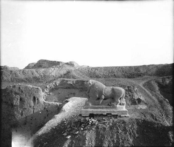 تمثال أسد بابل الذي عثر عليه في مدينة بابل الأثرية في العراق في عهد الدولة العثمانية في سنة 1776 من قبل بعثة حفريات أثرية ألمانية، وهو مصنوع من حجر البازلت الأسود الصلب، حيث يظهر هذا التمثال على شكل أسد يقف على شخص بشري، طوله يبلغ حوالي متران وهو موضوع على منصة طولها حوالي متر عثر عليها بالقرب من مبنى الجنائن المعلقة، رجح بناء هذا التمثال من قبل الملك البابلي الكلداني نبوخذ نصر الثاني (605-562 ق م)